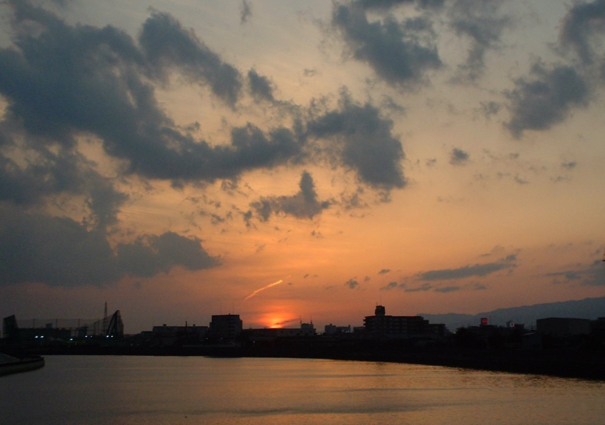 神崎川 国道176号 新三国橋からの夕景